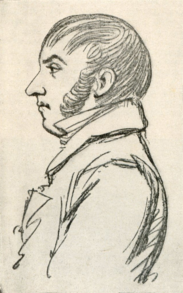 Беларуская (тарашкевіца): Партрэт Адама Чарноцкага (Adam Čarnocki), які праз рэпрэсіі расейскіх уладаў мусіў узяць псэўданім Зарыян Даленга-Хадакоўскі.